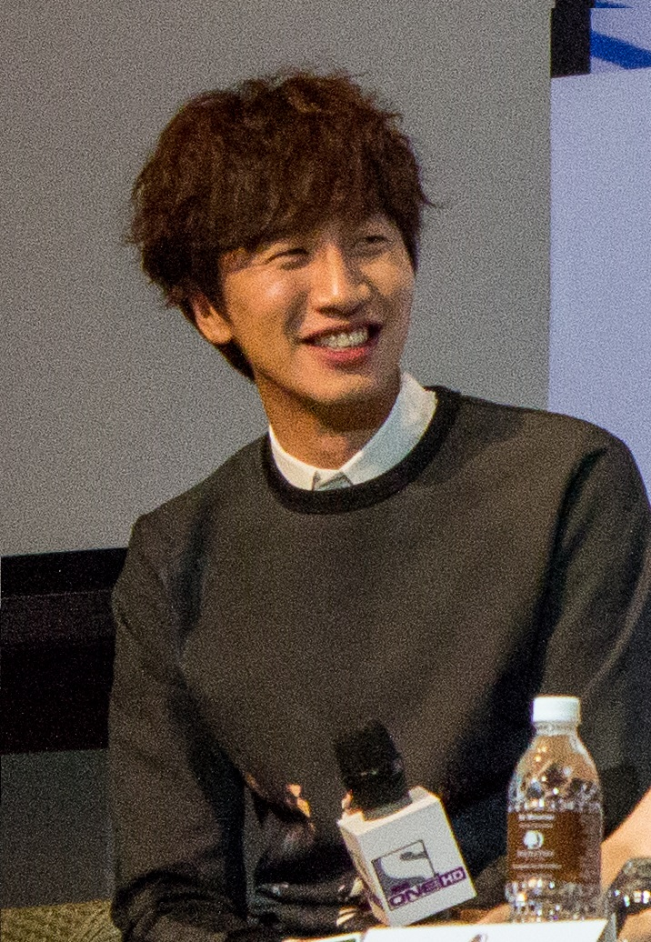 Lee Kwang-Soo at Malaysia for Running Man Fan Meeting Asian Tour 2014 - 2.jpg